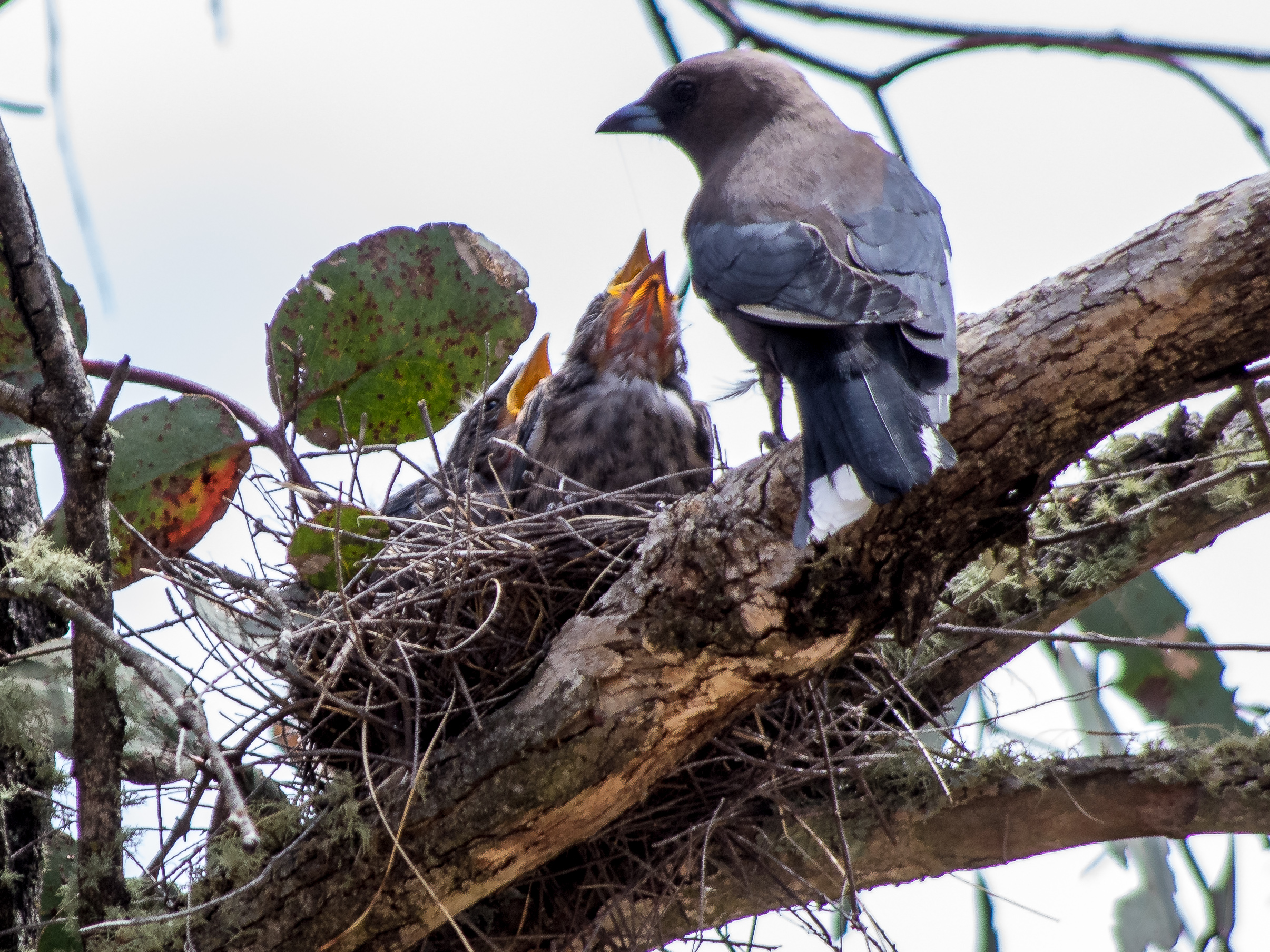 Feeding nestlings